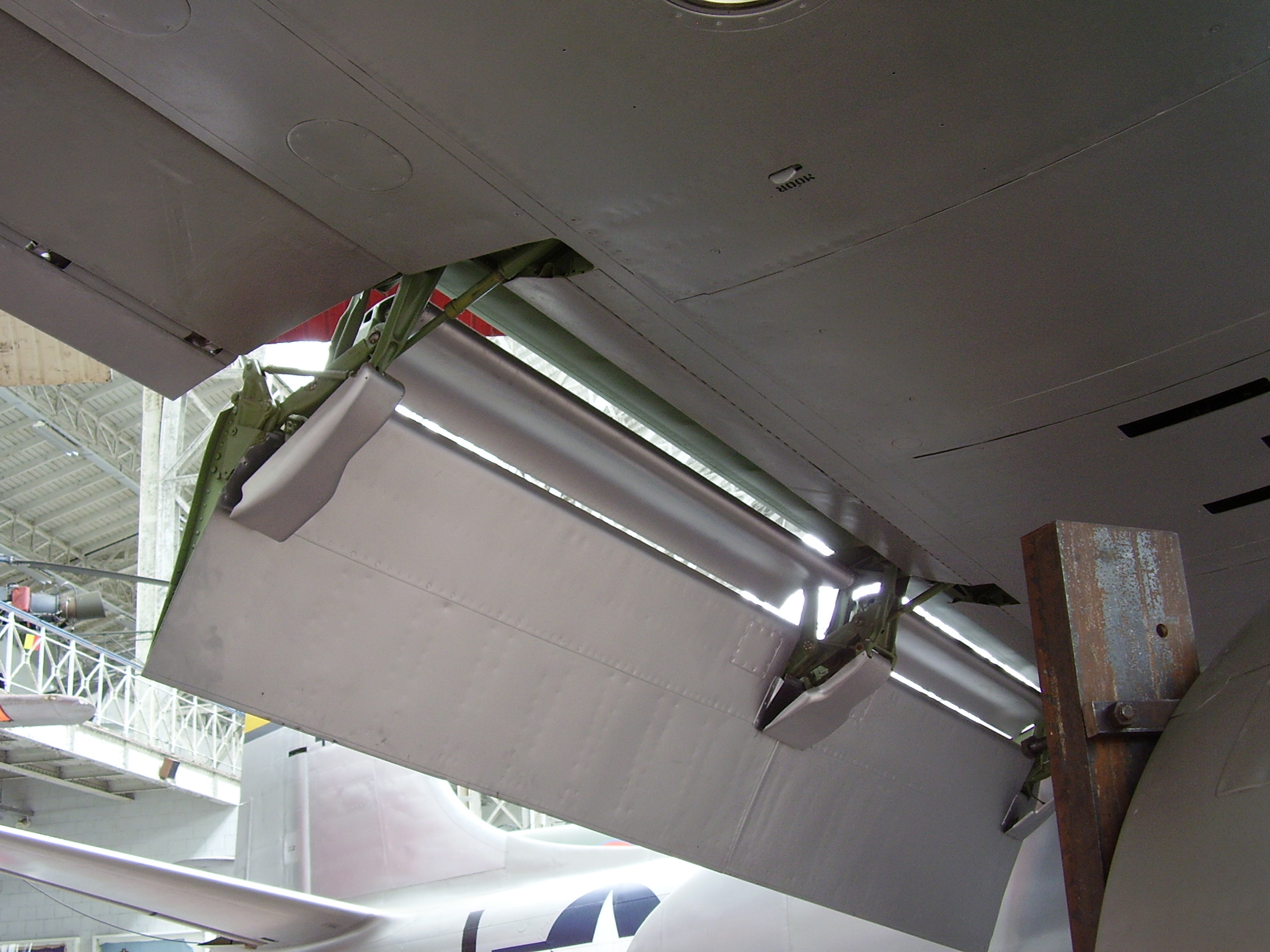 Royal Military Museum Brussels, Musée Royal de l'Armée, Koninklijk Museum van het Leger en de Krijgsgeschiedenis